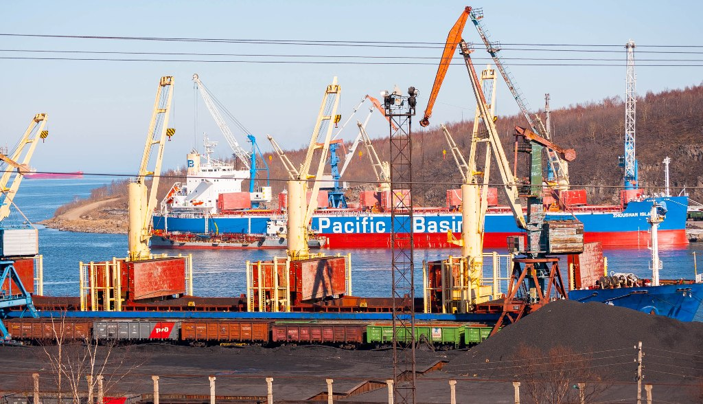 Порт Ванино